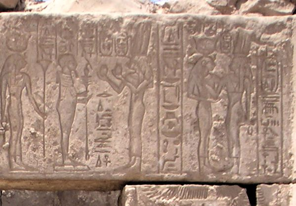 Relief représentant les divines adoratrices Chépénoupet II, faisant une offrande au dieu Ptah suivi de la déesse Hathor, et Aménirdis II accueillie par la déesse Hathor - Chapelle de Taharka et des divines adoratrices Chépénoupet II et Aménirdis II à Karnak - XXVe dynastie égyptienne